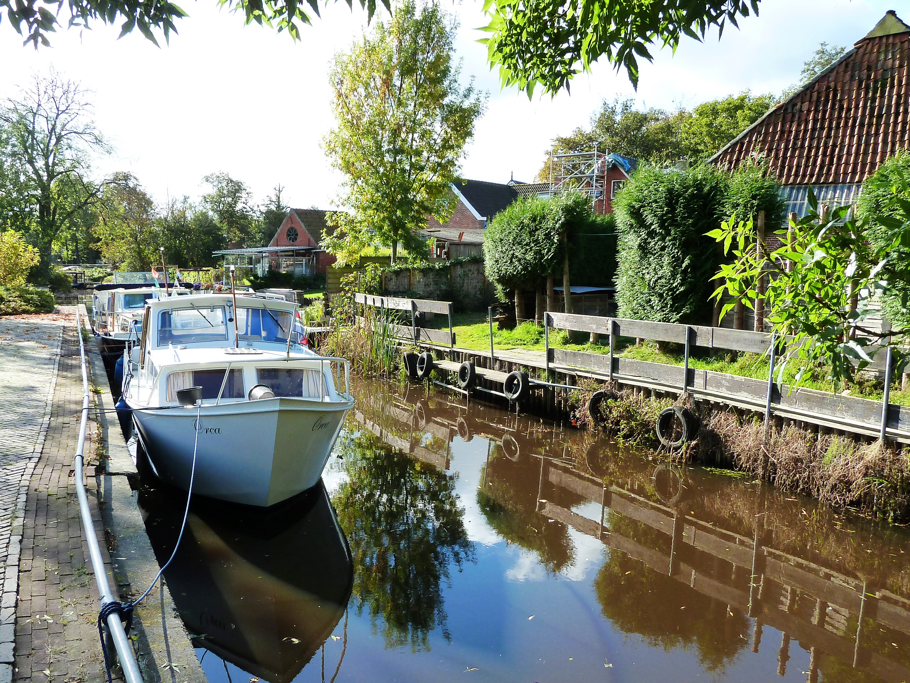 Vroegere haven van Visvliet. Aangelegd bij het uitgraven van het Visvlieterdiep tussen 1911 en 1915.